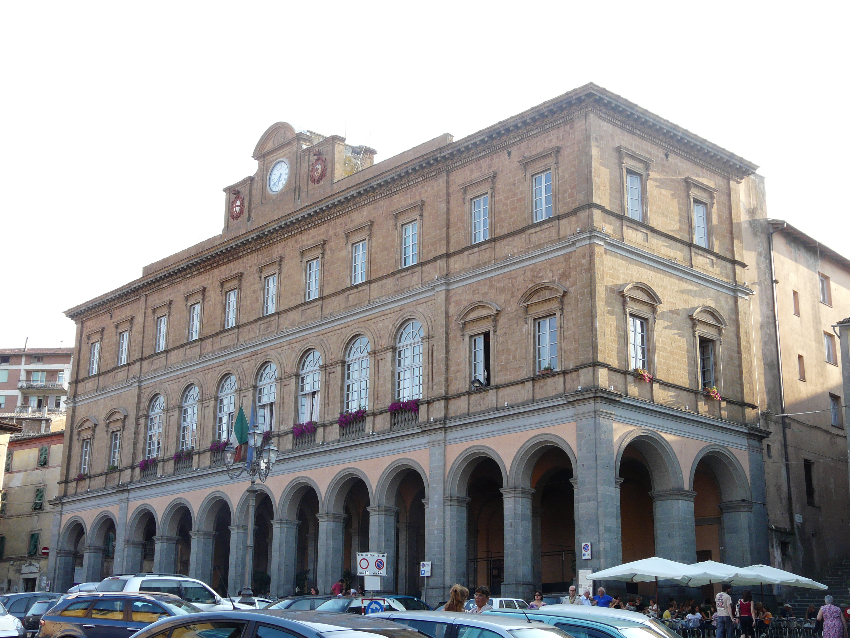 Municipio di Acquapendente, Lazio, Italia